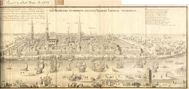 Scan from Johann Christoph Brotze's book Sammlung verschiedner Liefländischer Monumente. Prospect der Stadt Riga Anno 1612 [die Ansicht].